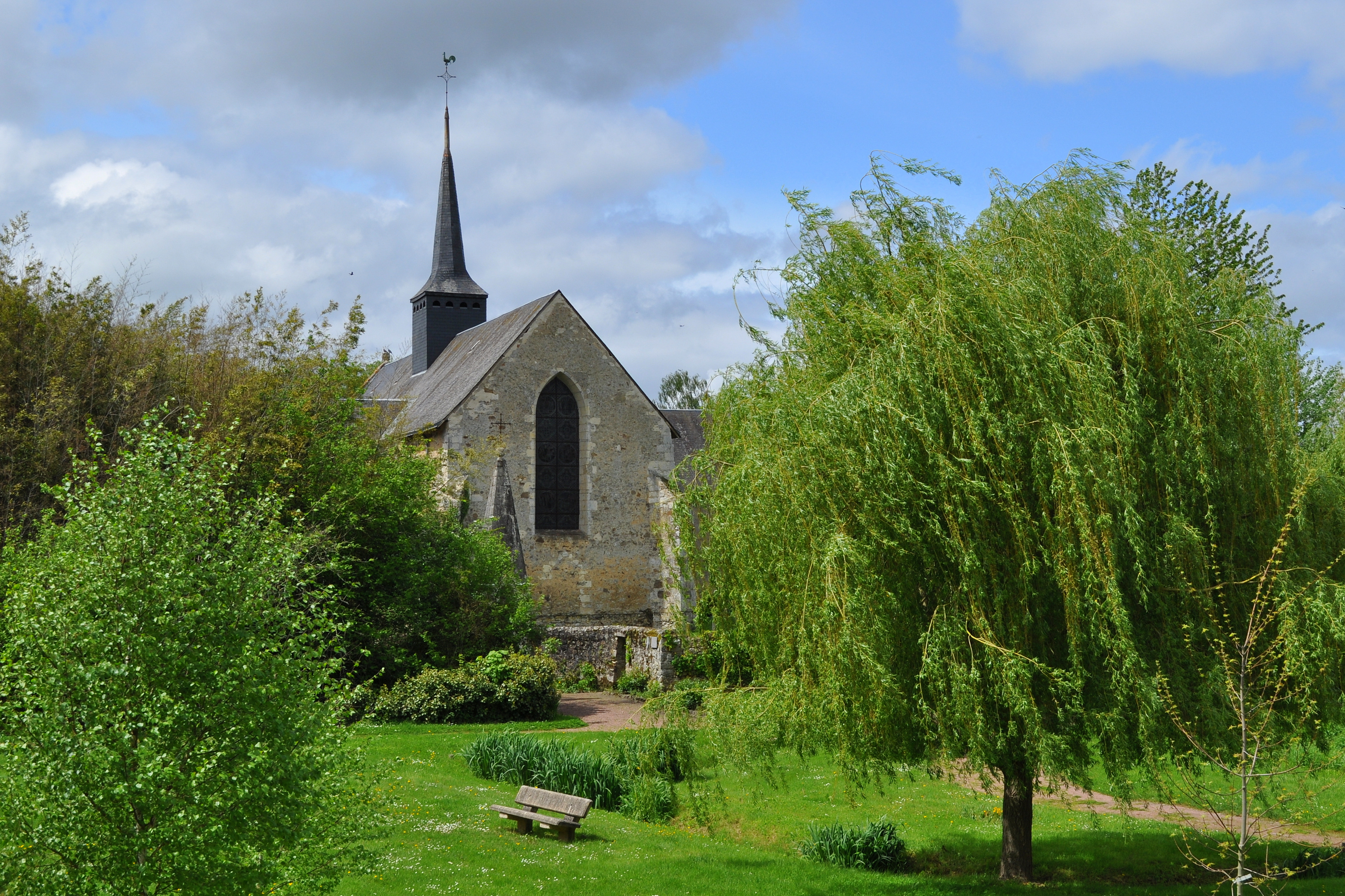 Eglise Saint-Martin de La Fontaine-Saint-Martin (Sarthe)